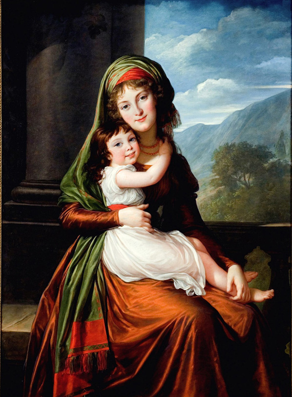 University of Arizona Museum of Art, Tuscon: 1793 Countess von Schönfeld and Her Daughter